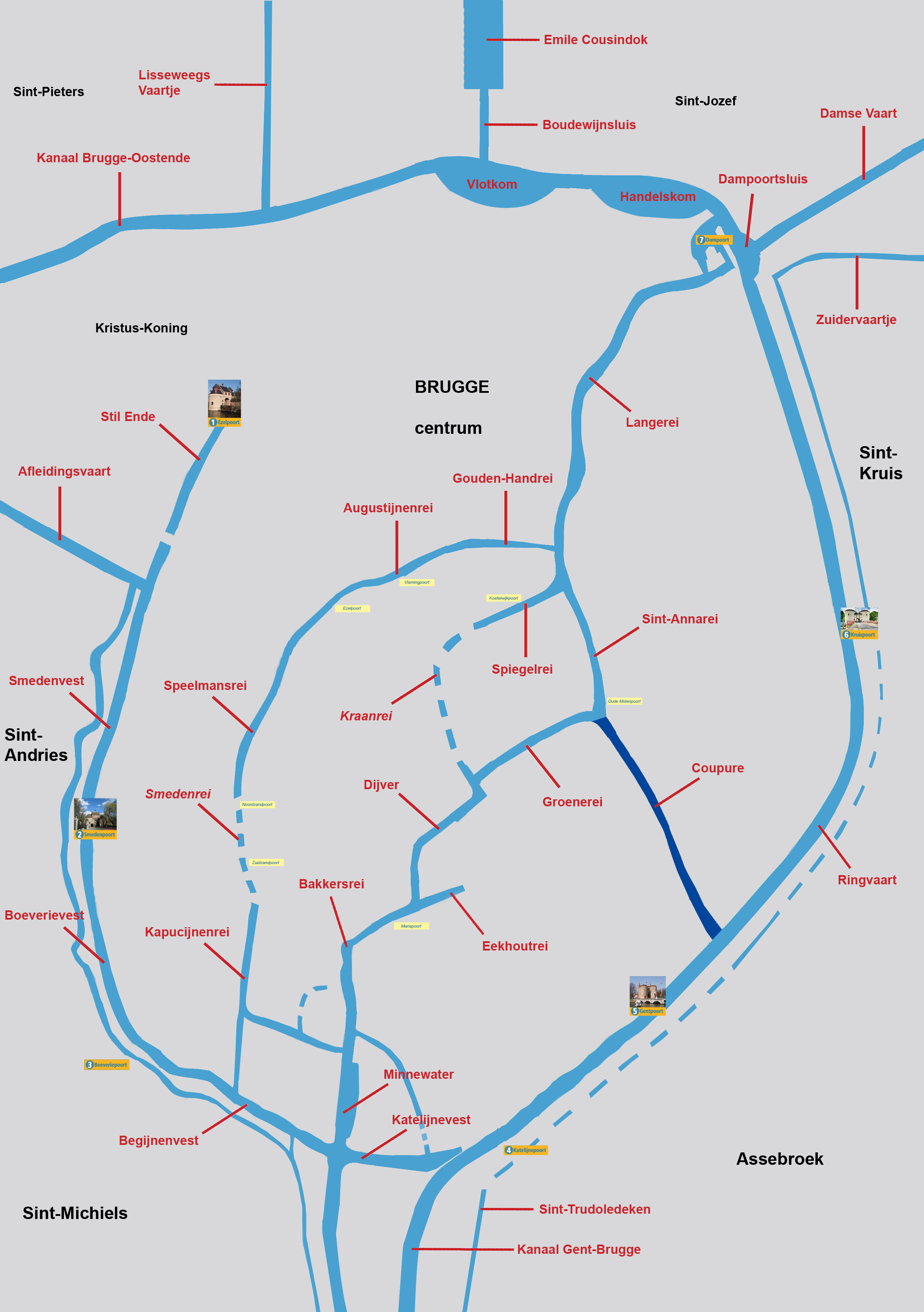 Situering van de Coupre